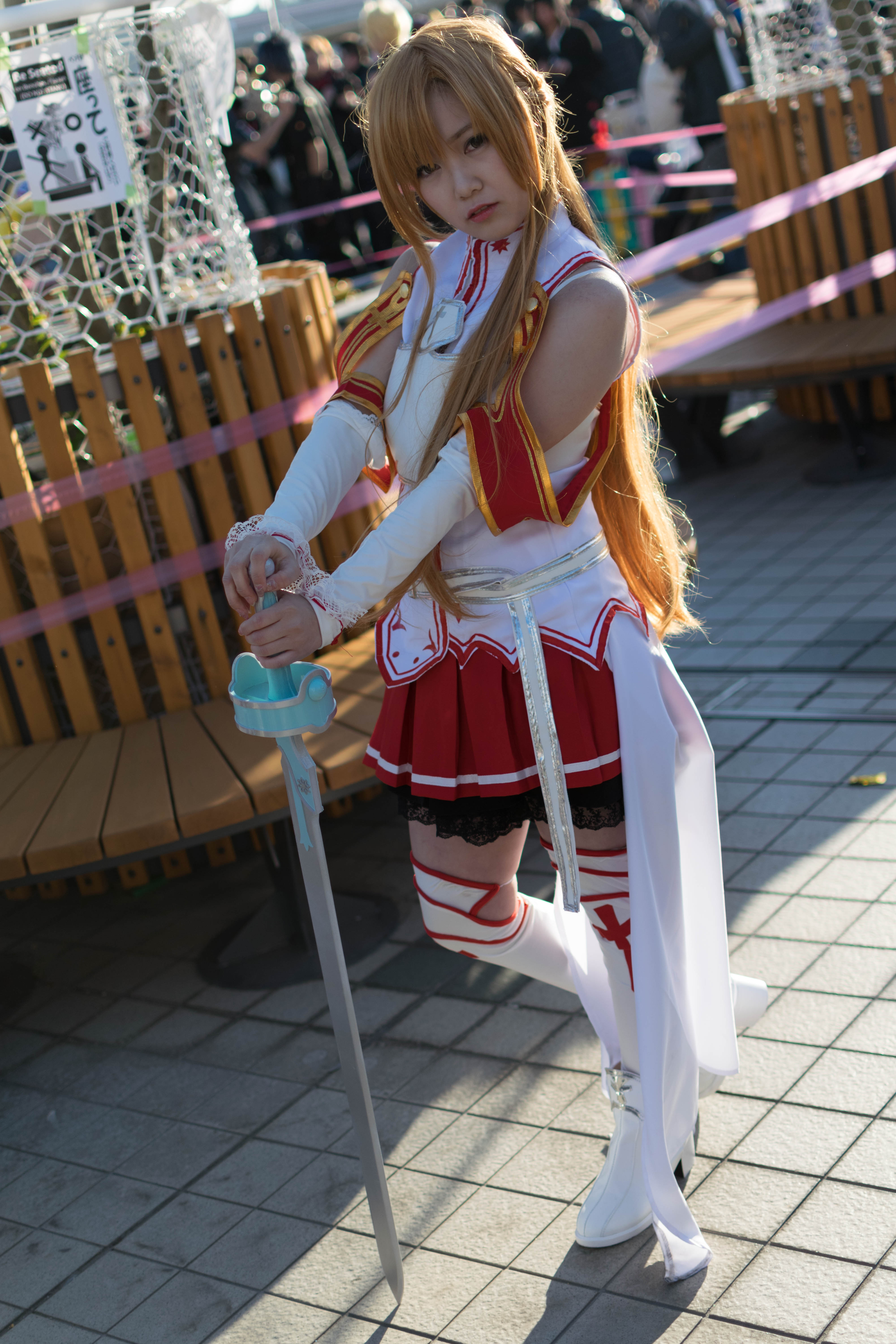 Asuna